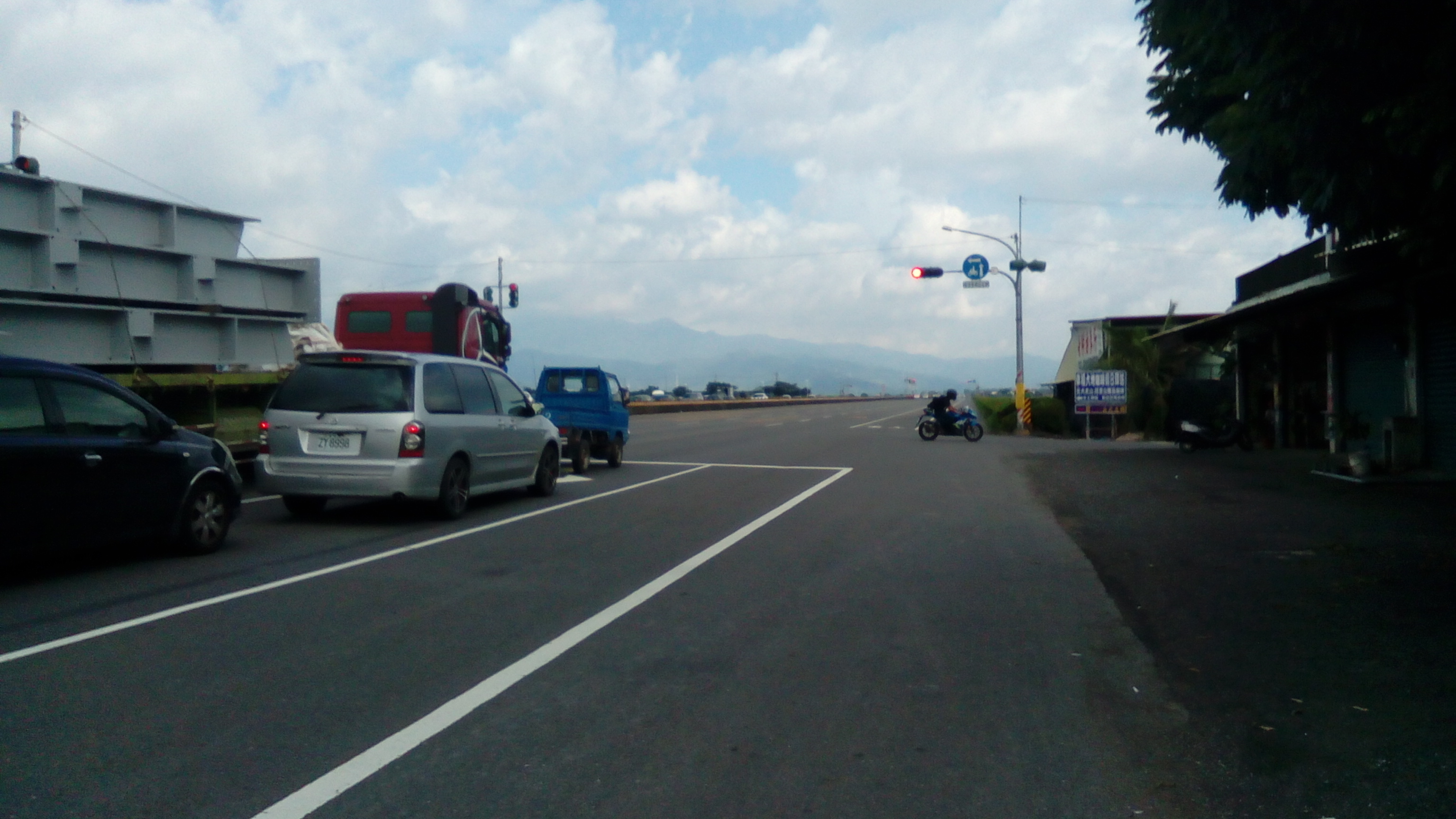 即台1線430k 枋寮與佳冬交界路段